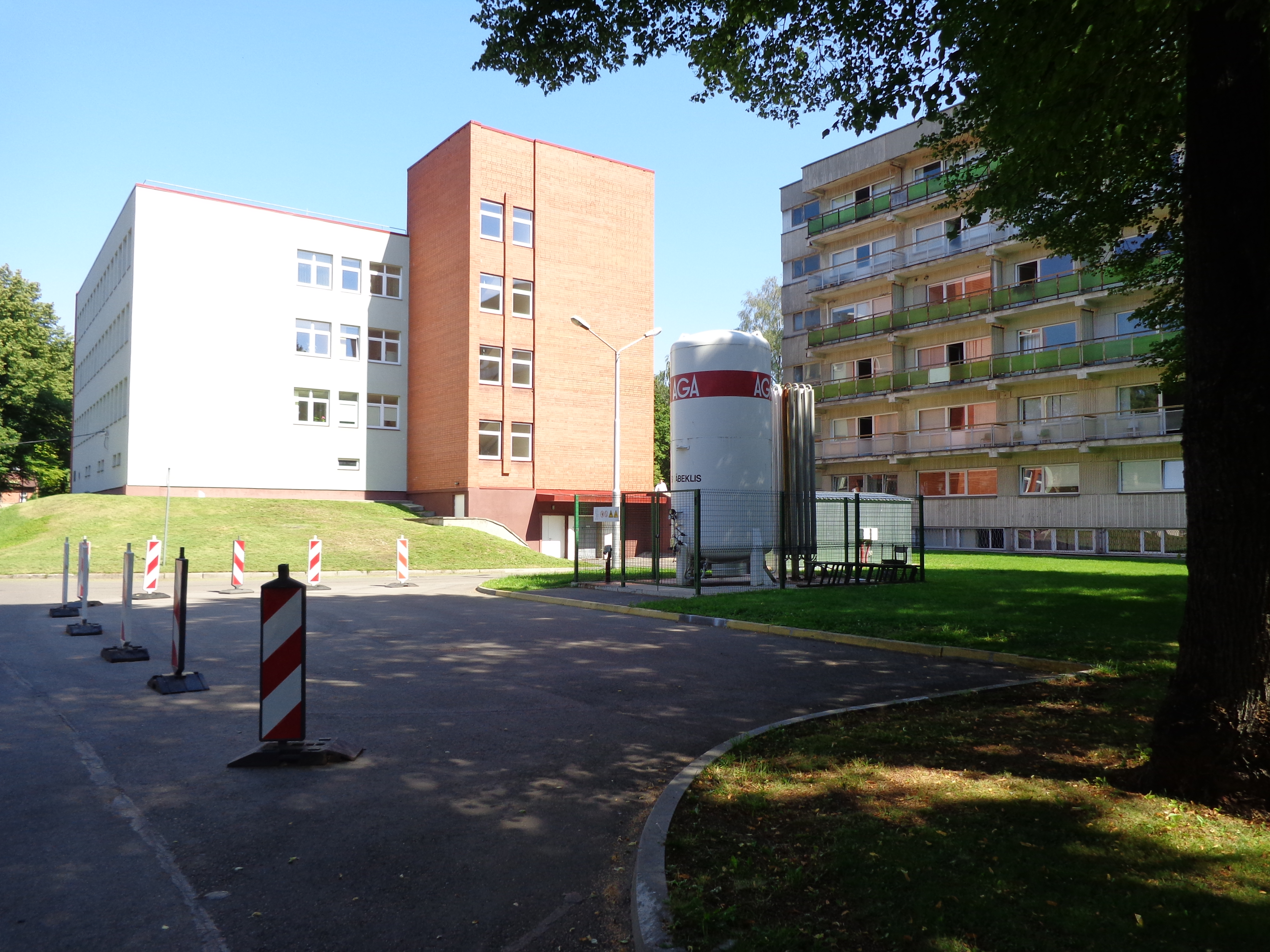 Rīga, Pilsoņu iela(street) 13